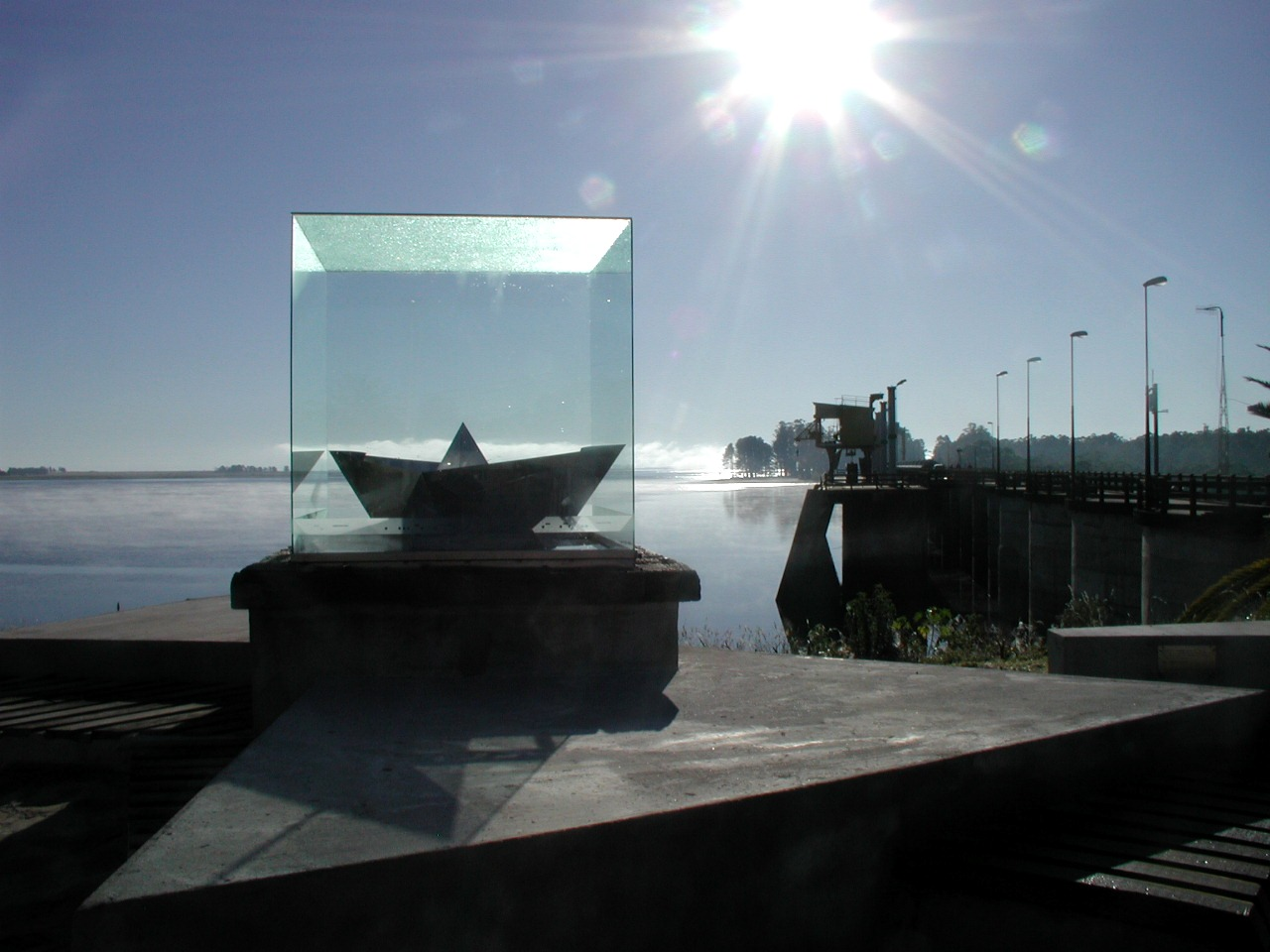 Escultura conmemorativa de los 50 años de la Creciente de 1959 que sobrepaso el dique de la Central Hidroeléctrica Dr. Gabriel Terra (Rincón del Bonete) e inundo parte de la ciudad aledaña Paso de los Toros; autor: Fernando Stevenazzi.